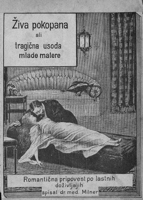 Živa pokopana, naslovnica romana